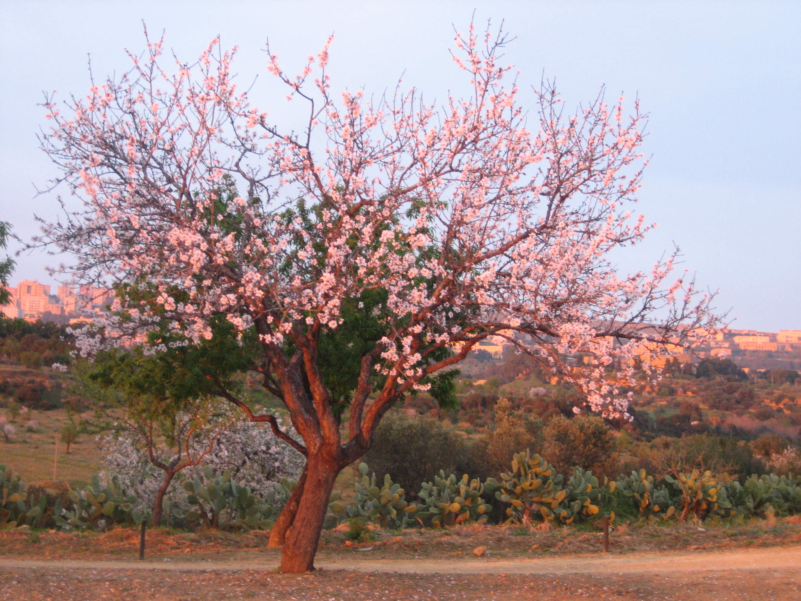 blühender Mandelbaum (Prunus dulcis) bei Agrigent . Die Mandelblüten sind rosa, da das Bild bei Sonnenuntergang aufgenommen wurde.Die Mandelblüte wird jedes Jahr zwischen dem 1. und 2. sonntag im Februar in Agrigent gefeiert.